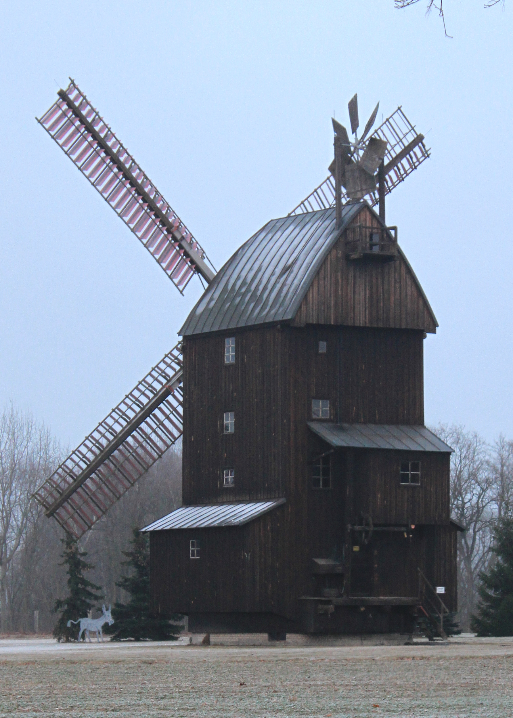 Paltrockmühle Schönewalde (steht unter Denkmalschutz).